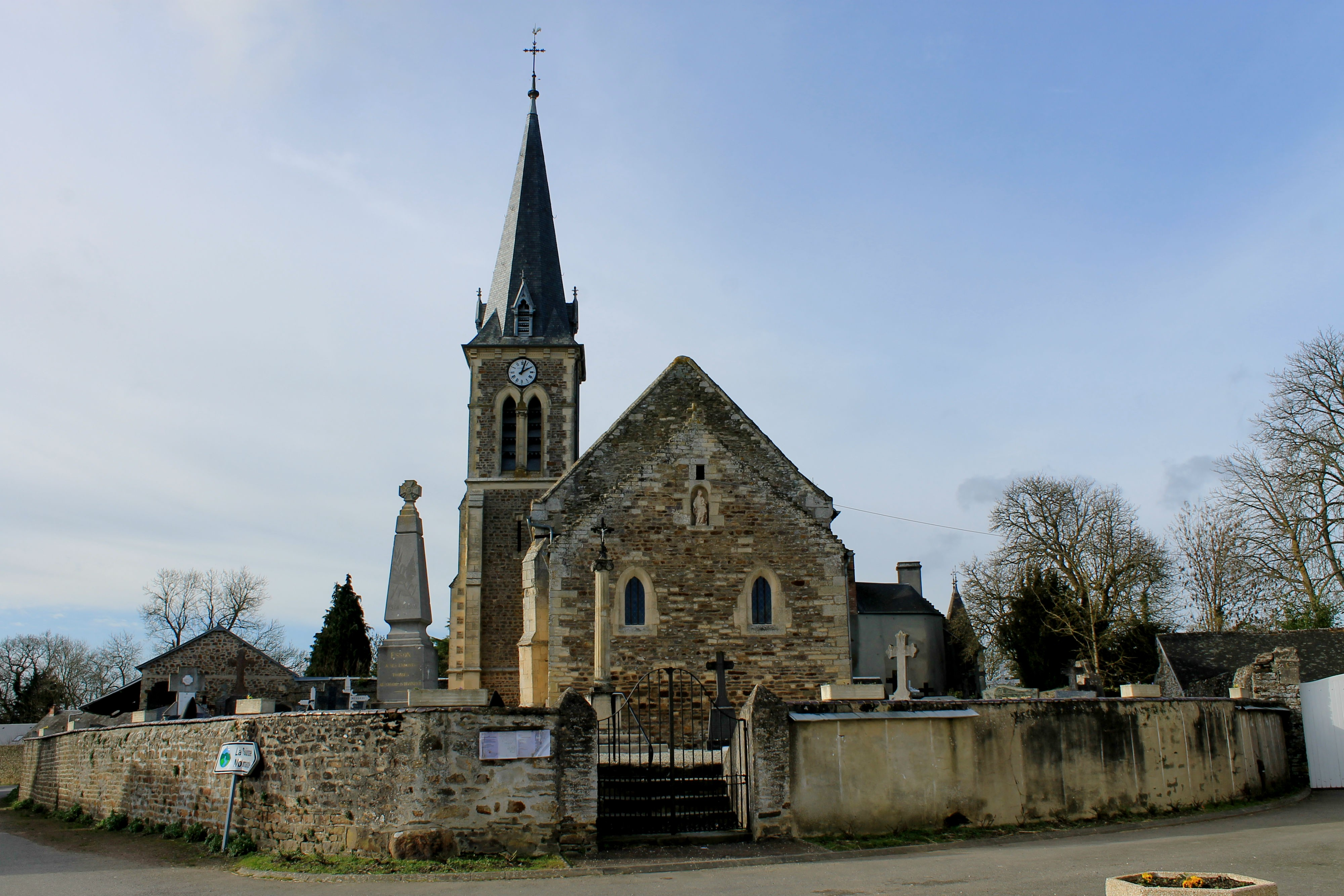 Église de la Nativité-de-Notre-Dame du XVe à Esson (Calvados)